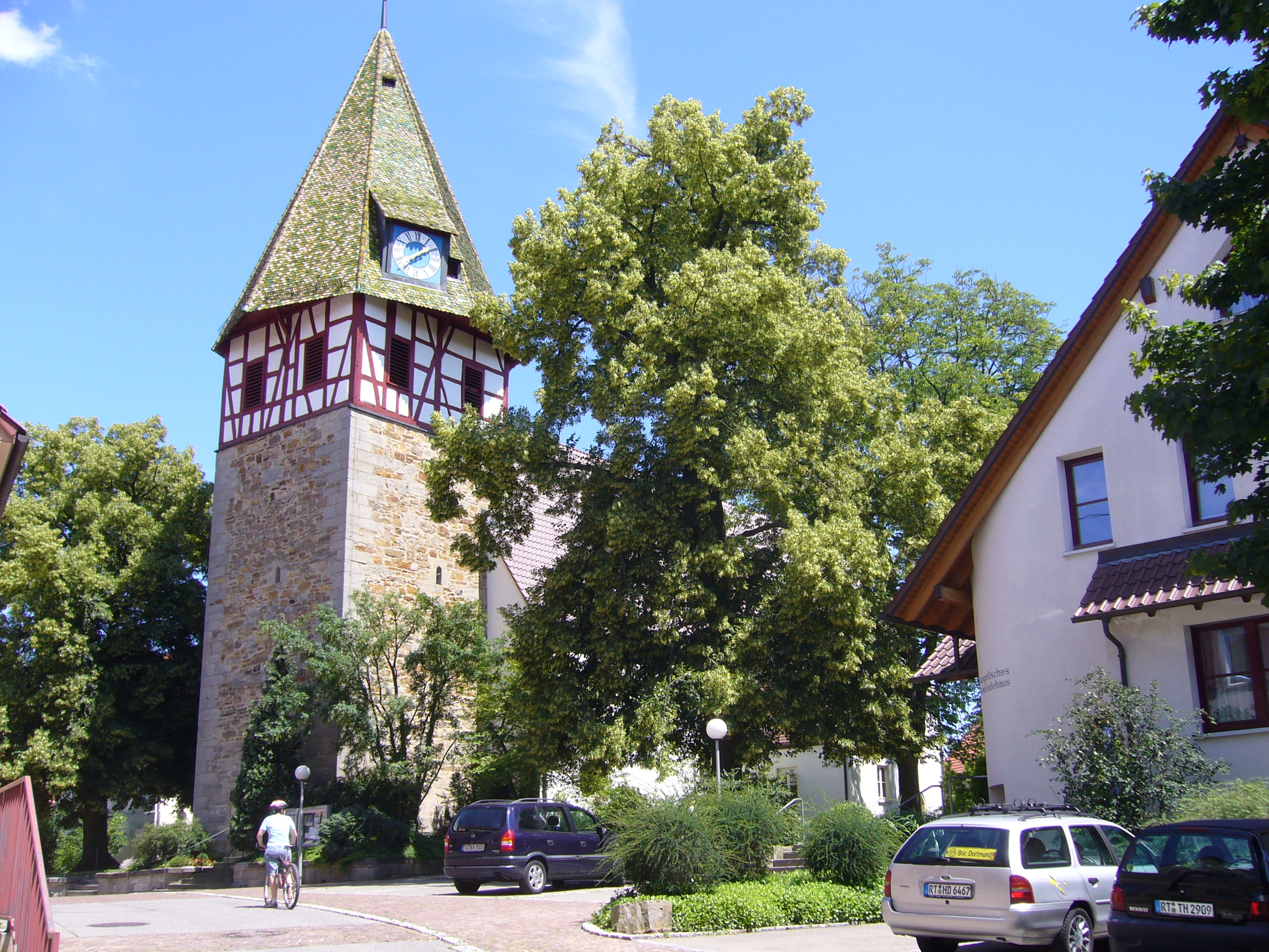 Walddorfhäslach, Landkreis Reutlingen, Kirche Walddorf